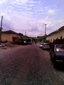 Fotos para recordar